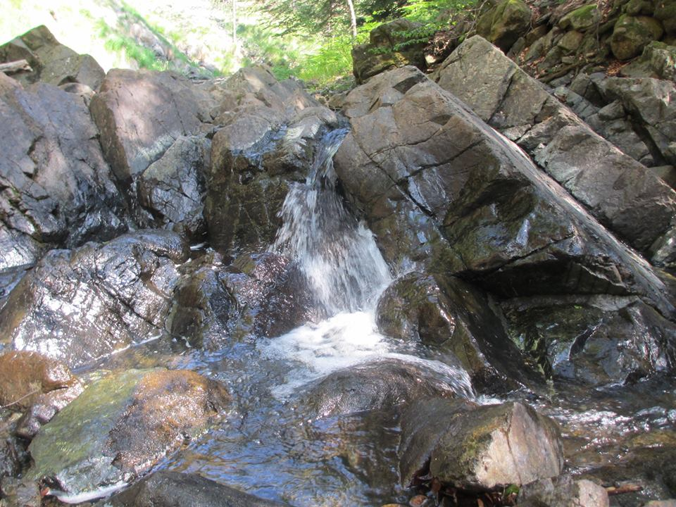 Čalački potok na Divčibarama